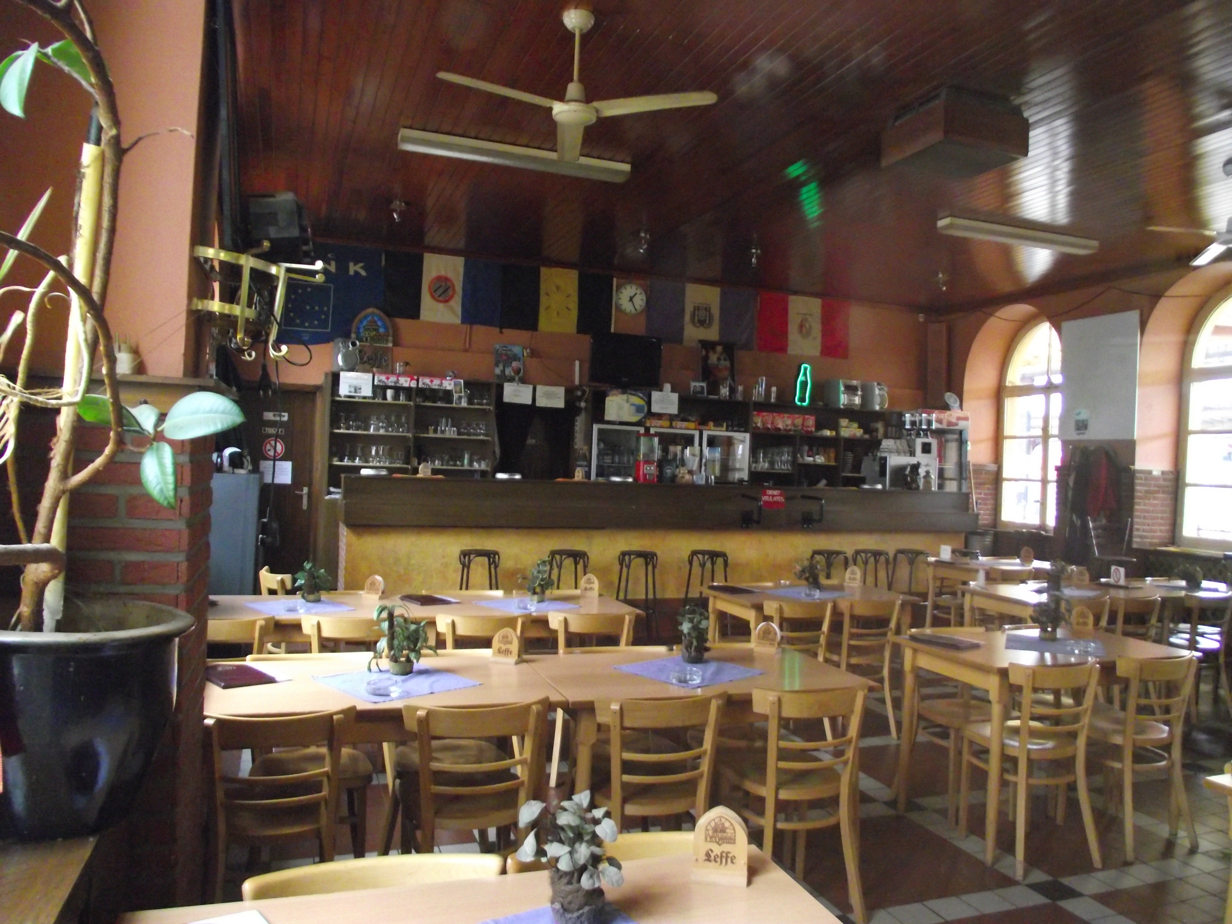 Stationskroeg/restauratie van Tienen. Typisch stationskroeg die snel aan het verdwijnen is.